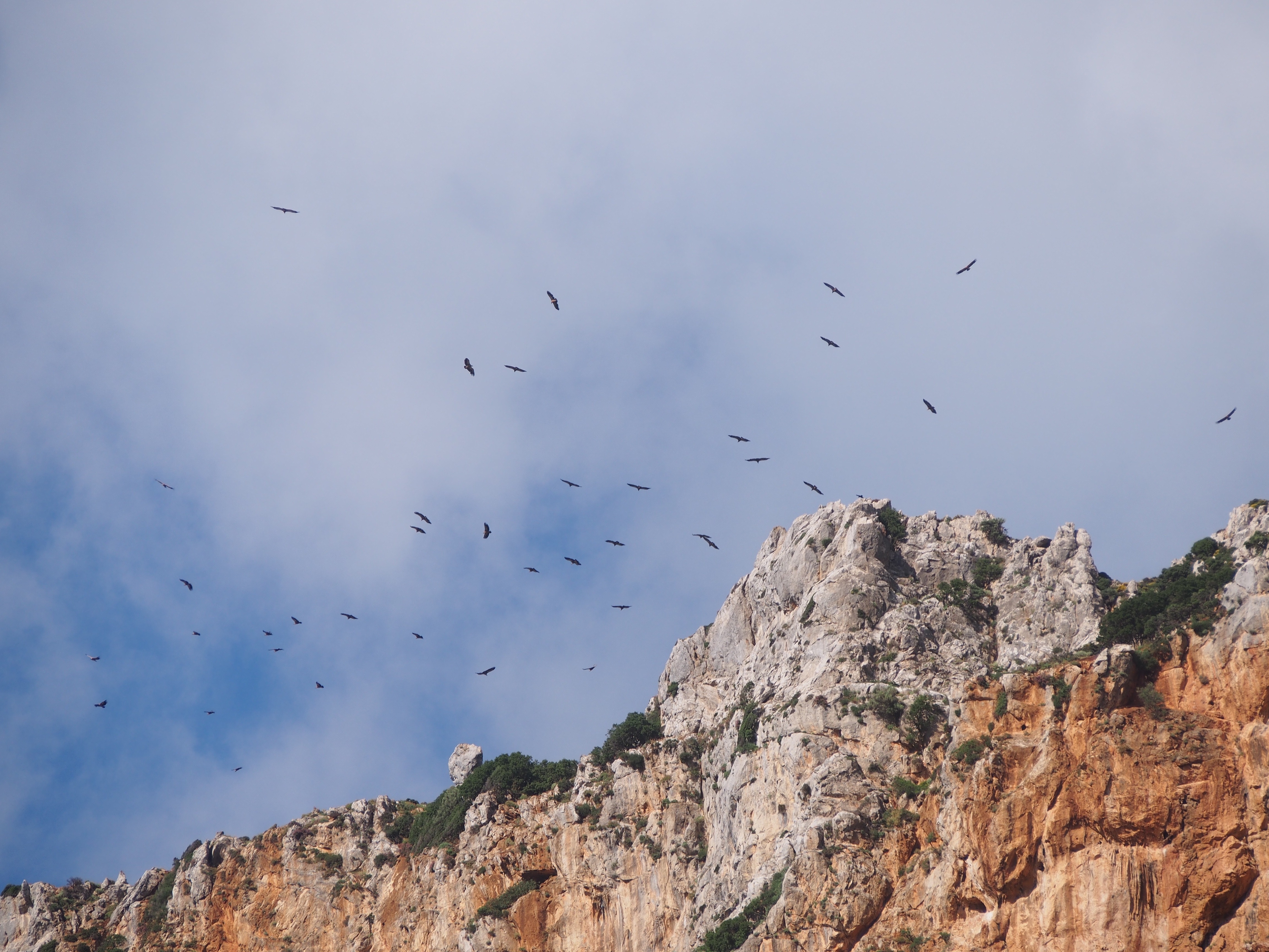 Σμήνος από όρνια στον Γιούχτα, Κρήτη. Άποψη από τη δυτική ρίζα του βουνού. This is a photography of Natura 2000 protected area with ID GR4310010